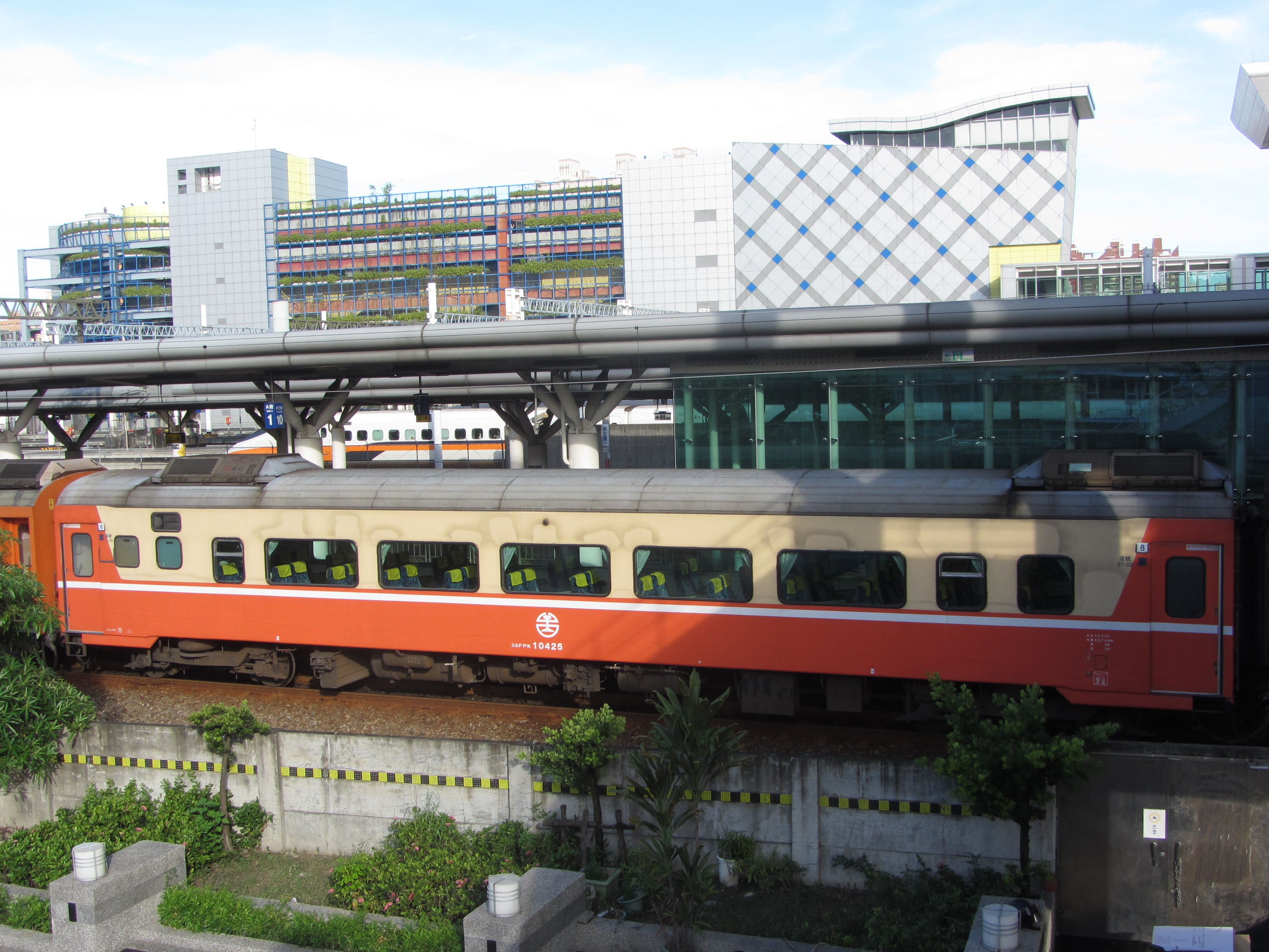 臺灣鐵路管理局莒光號客車FPK10425停靠新左營車站。